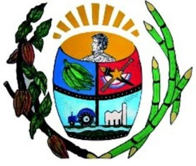 Escudo del Municipio Veroes de Venezuela